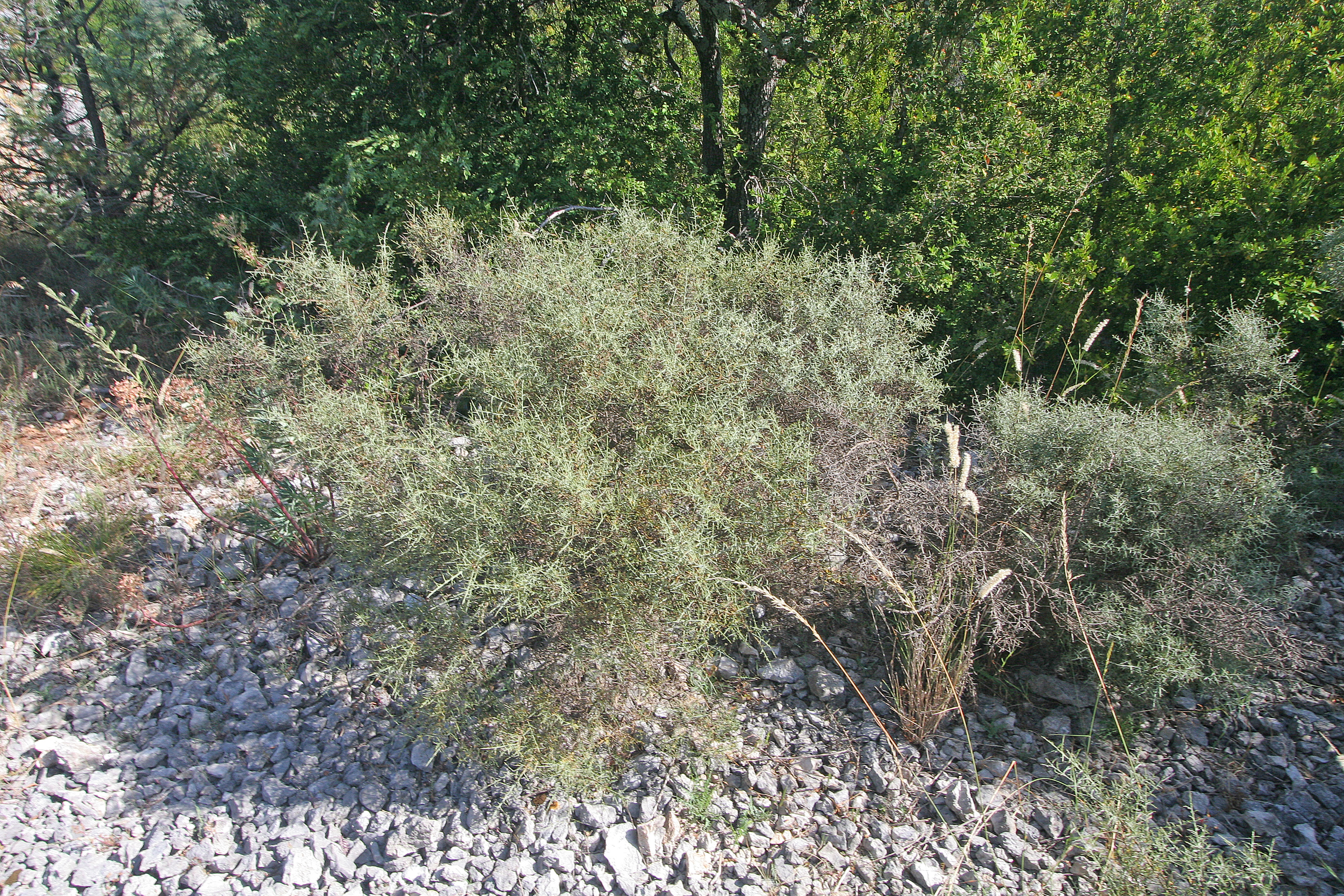 Plants in Ardeche